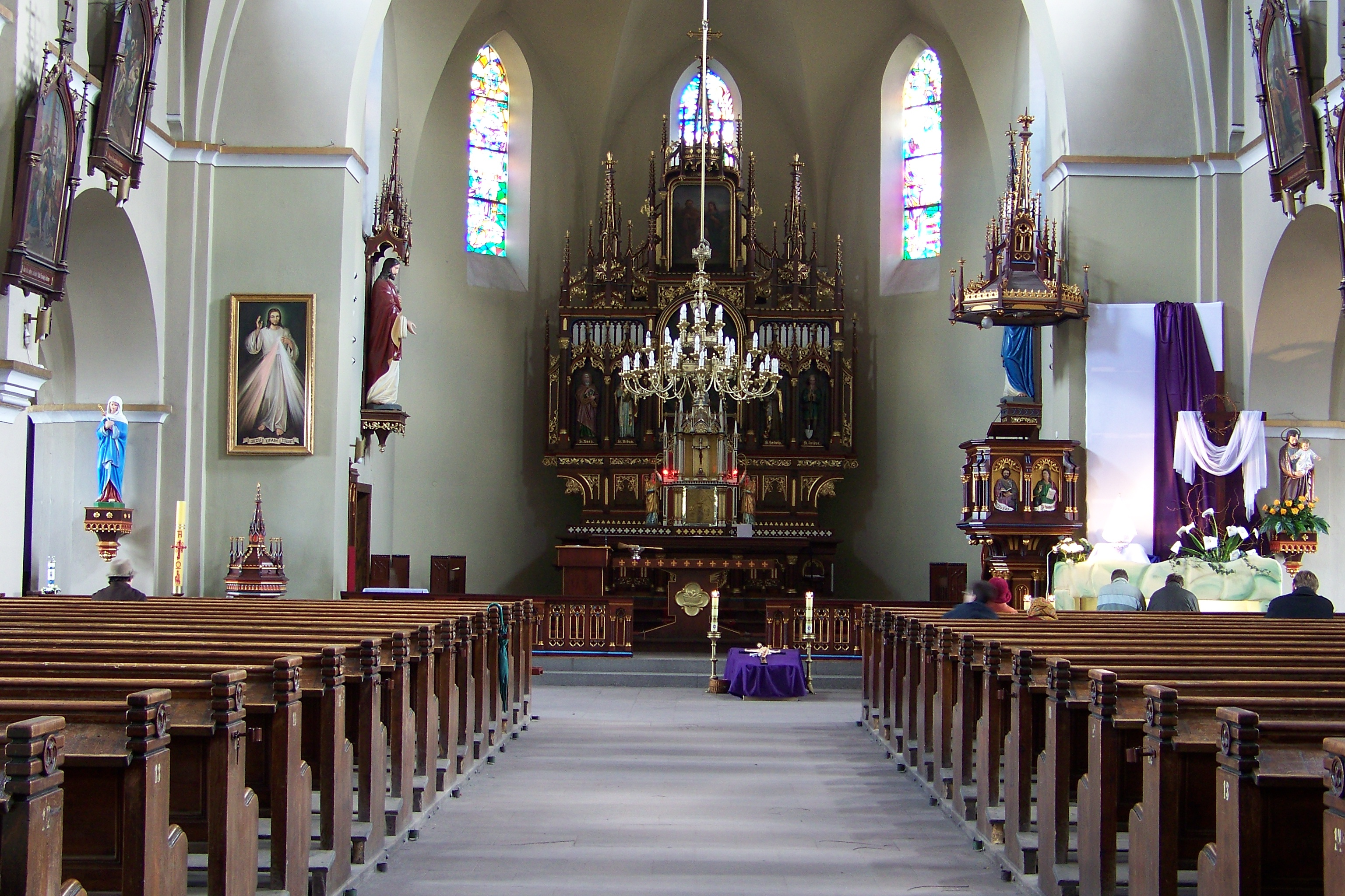 Lyski, kosciol parafialny